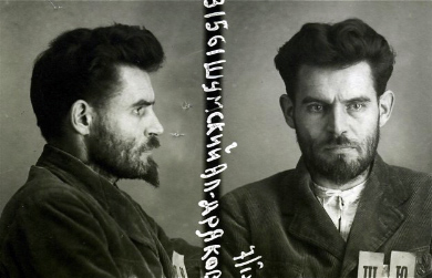 Олександр Шумський. В'язничне фото